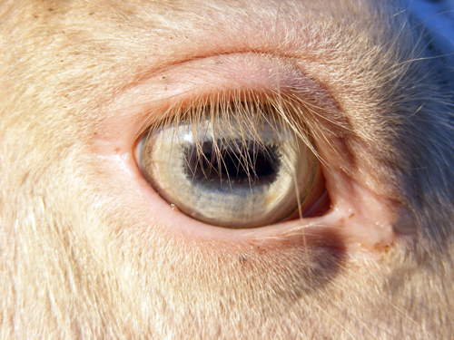 Öga hos en rökvit häst (Eye of a smoky cream horse)